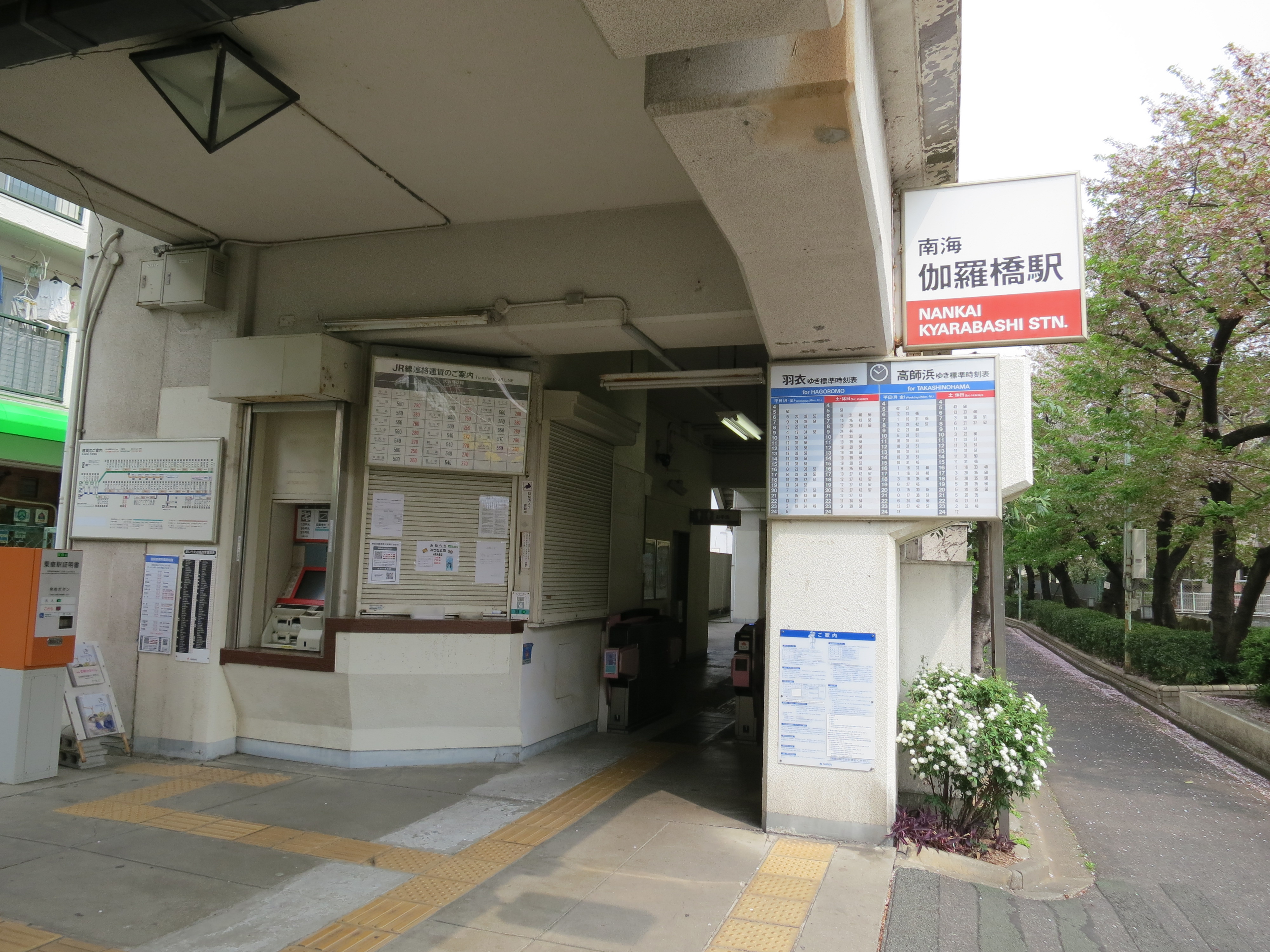 南海伽羅橋駅 Canon PowerShot S100